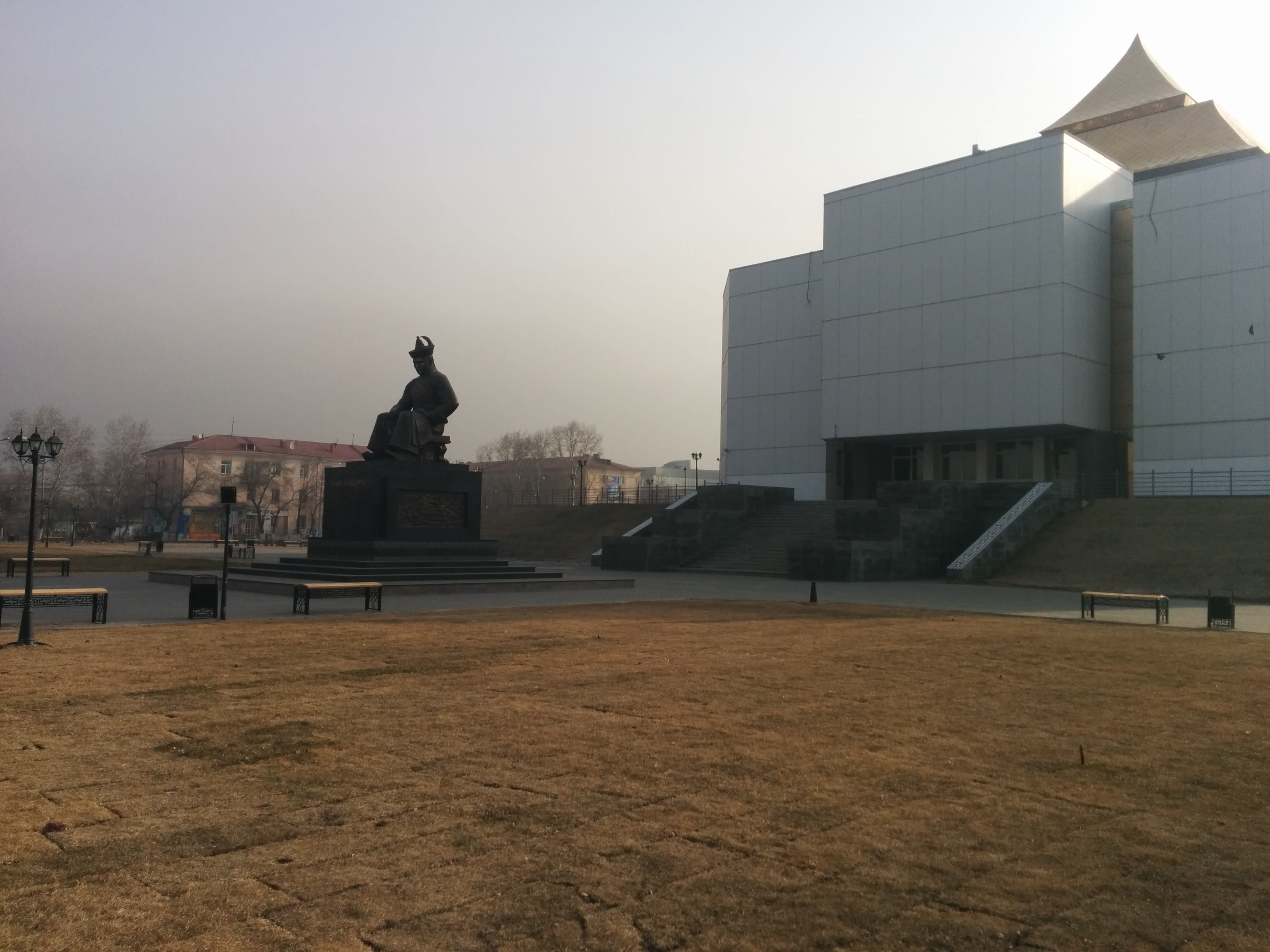 Тыва дыл: Тываның Национал Музейиниң соңгу талазында Буян-Бадыргының тураскаалы. 2014 чыл. Ырактан тырттырган чурук